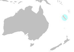 Description=Areale di distribuzione della specie